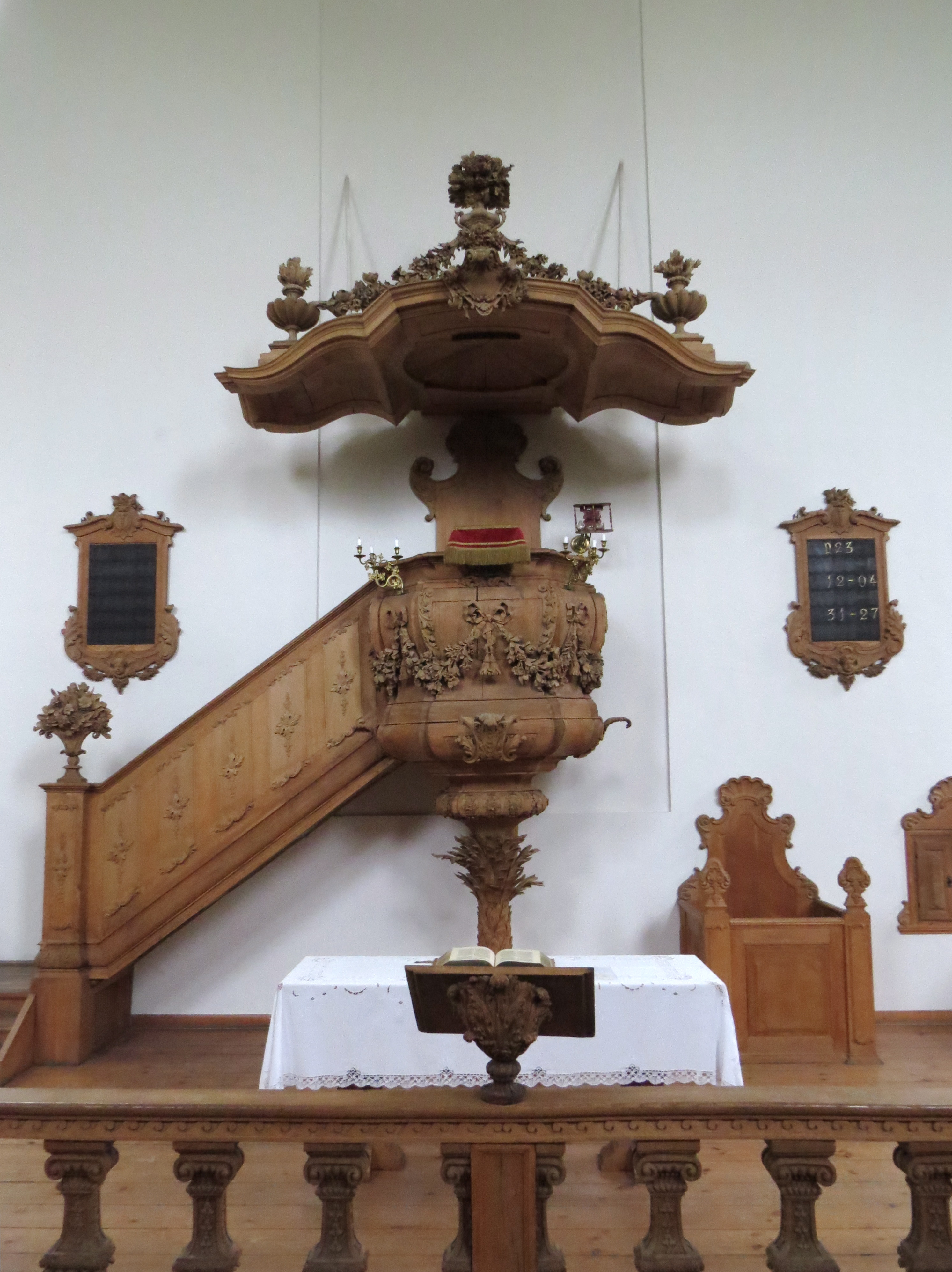 Prædikestol i Reformert Kirke, København